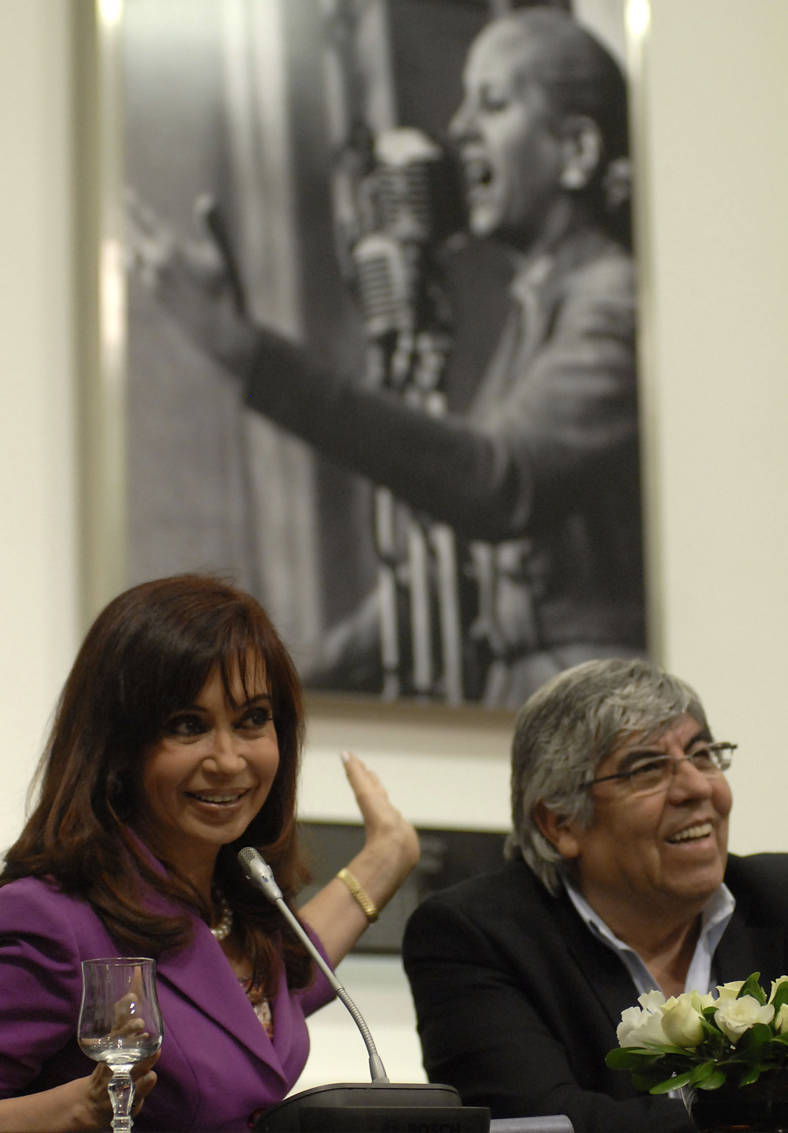 Cristina Fernández señala un cuadro de Eva Perón, junto al titular de la CGT, Hugo Moyano.